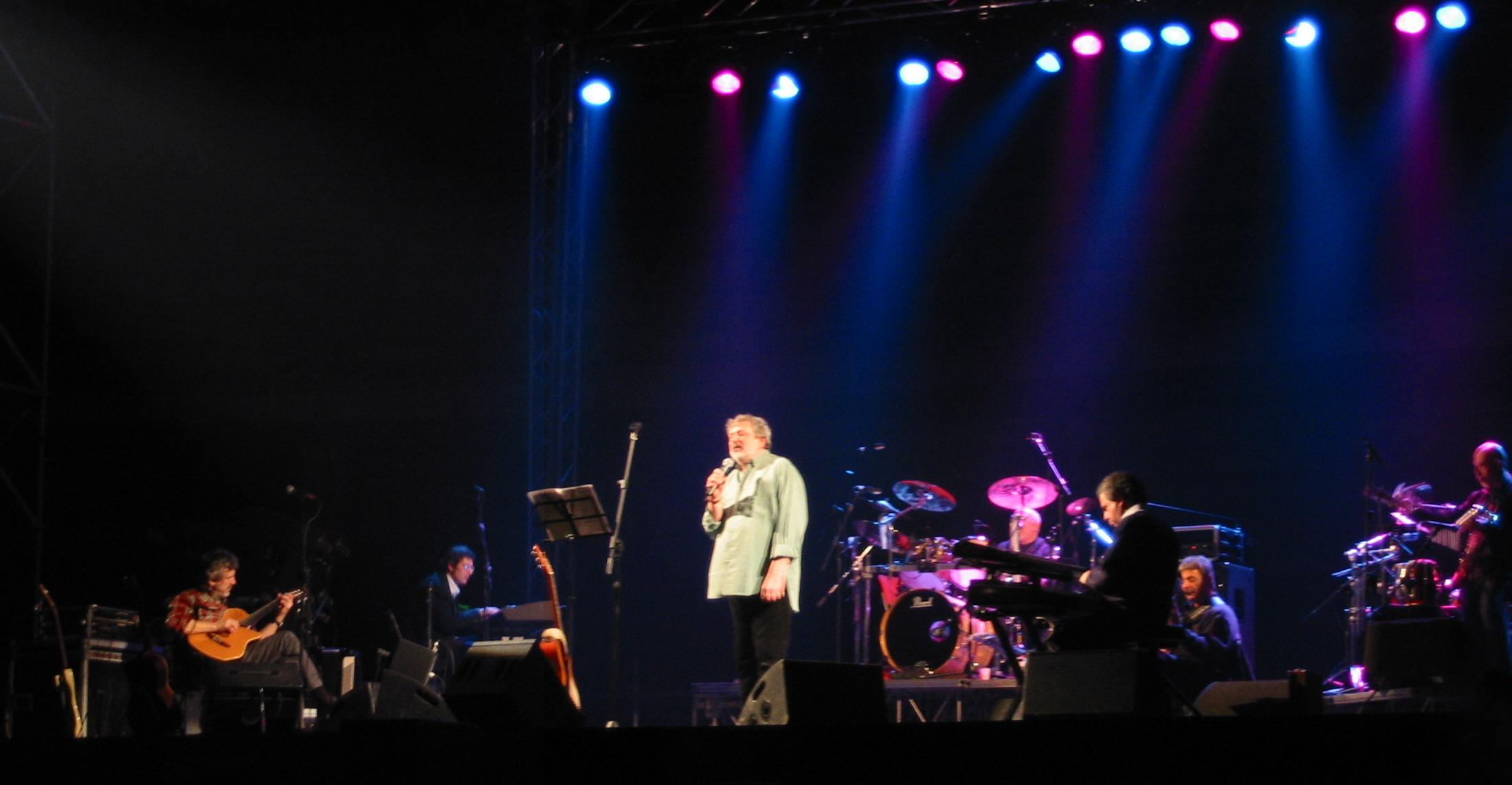 Francesco Guccini e band, live al Palaghiaccio di Marino, marzo 2003